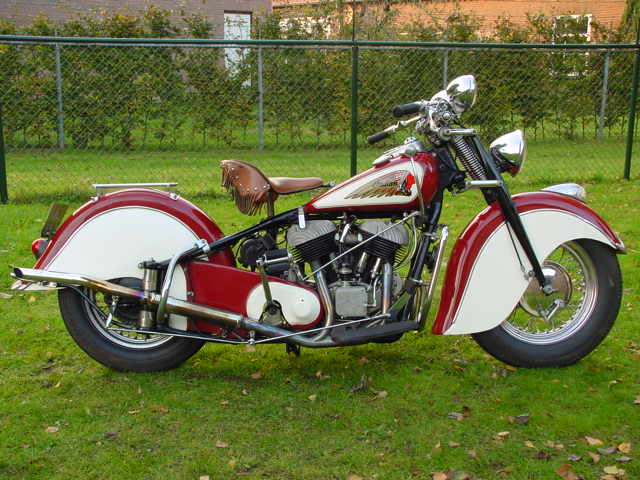 Toestemming van Yesterdays Antique Motorcycles